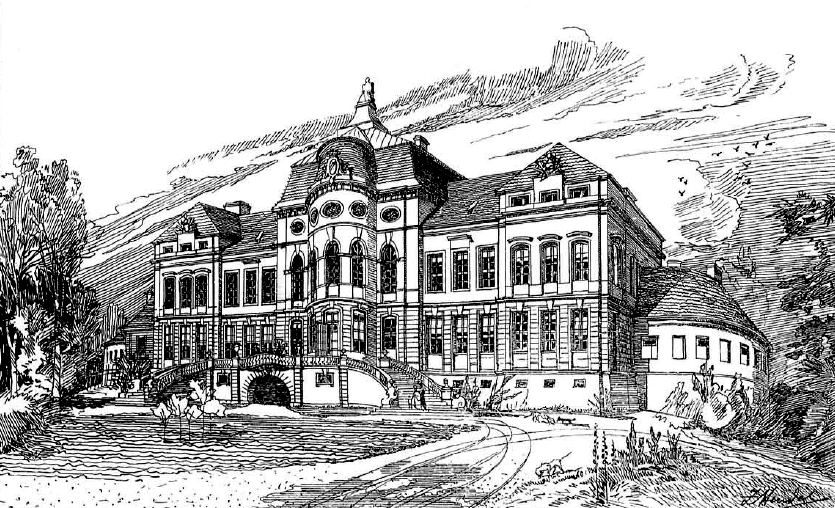 Палац у Рогаліні, Польща. Рисунок Зигмунта Генделя (1862—1929).